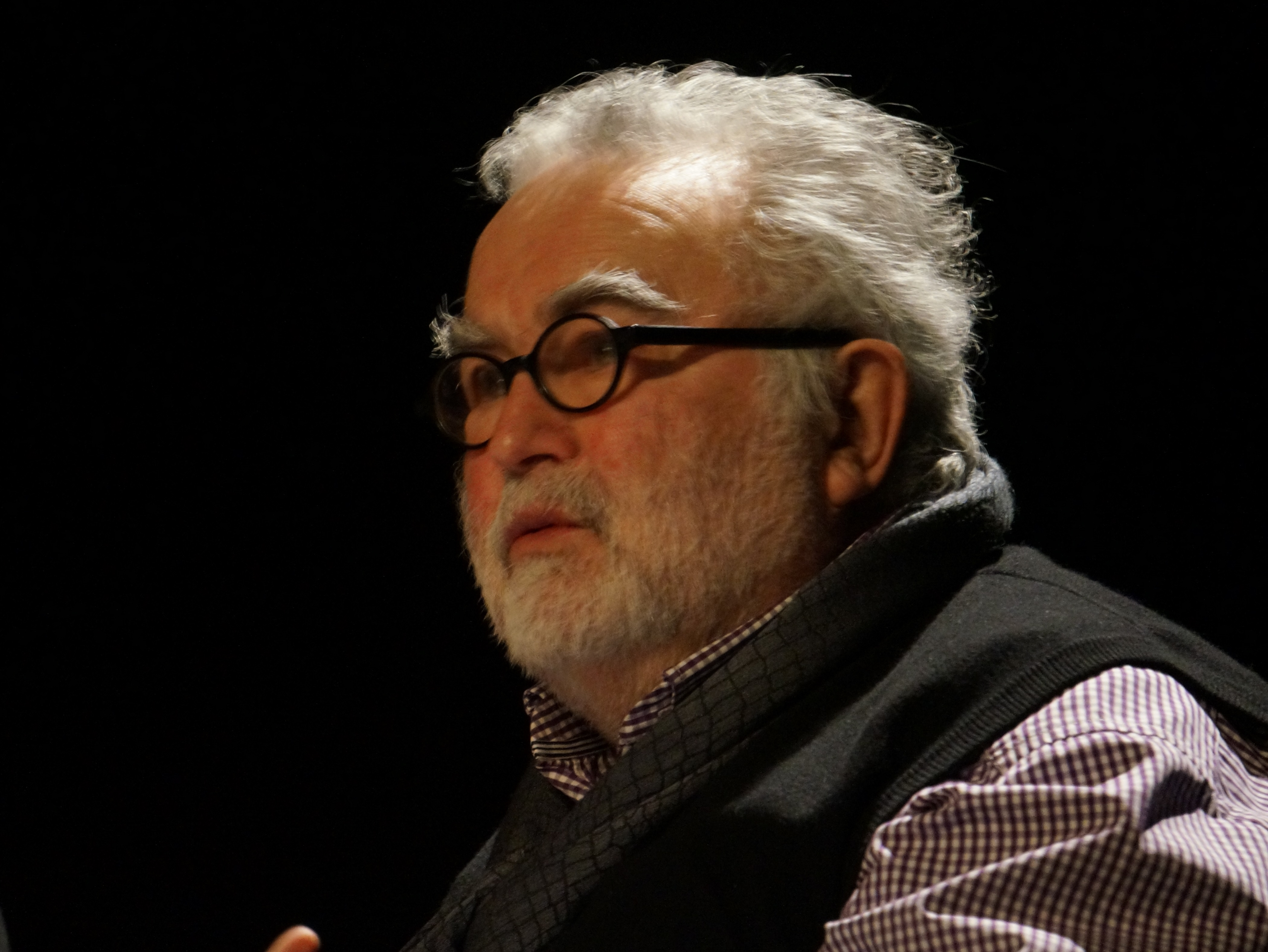 Grand débat : L'art et la guerre.